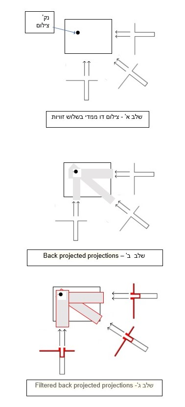 תמונה זו מתארת את השלבים בטכניקת FBP ליצירת תמונת טומוגרפיית פוטון בודד.